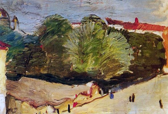 А. Е. Карев. Андреевский рынок. (Городской пейзаж). 1932. 70х52 см